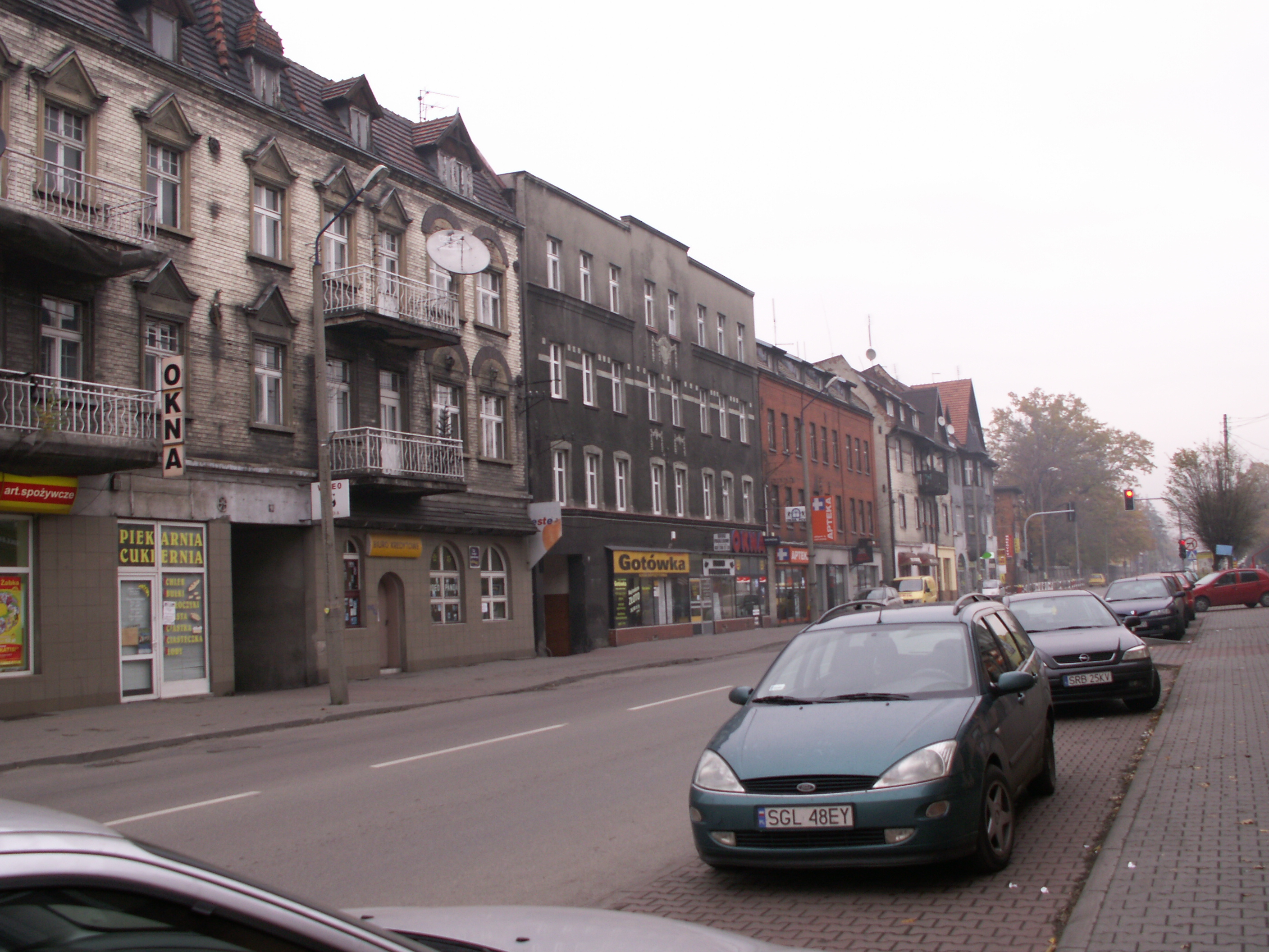 Fragment głównej knurowskiej ulicy - ul. Niepodległości.